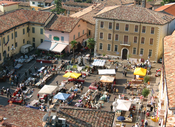 "Mercantico", Lonato, Brescia